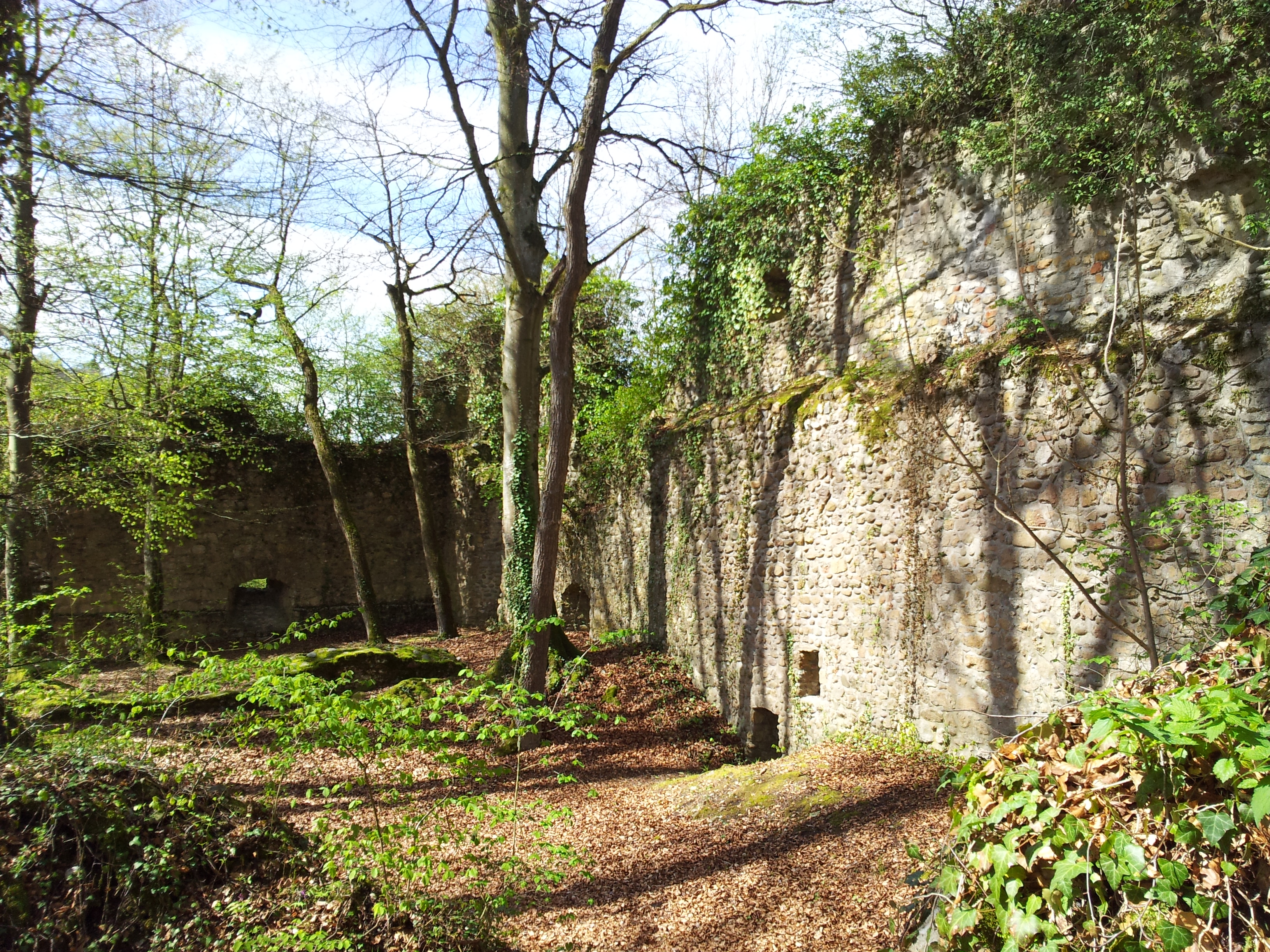 Burgruine Weisswasserstelz